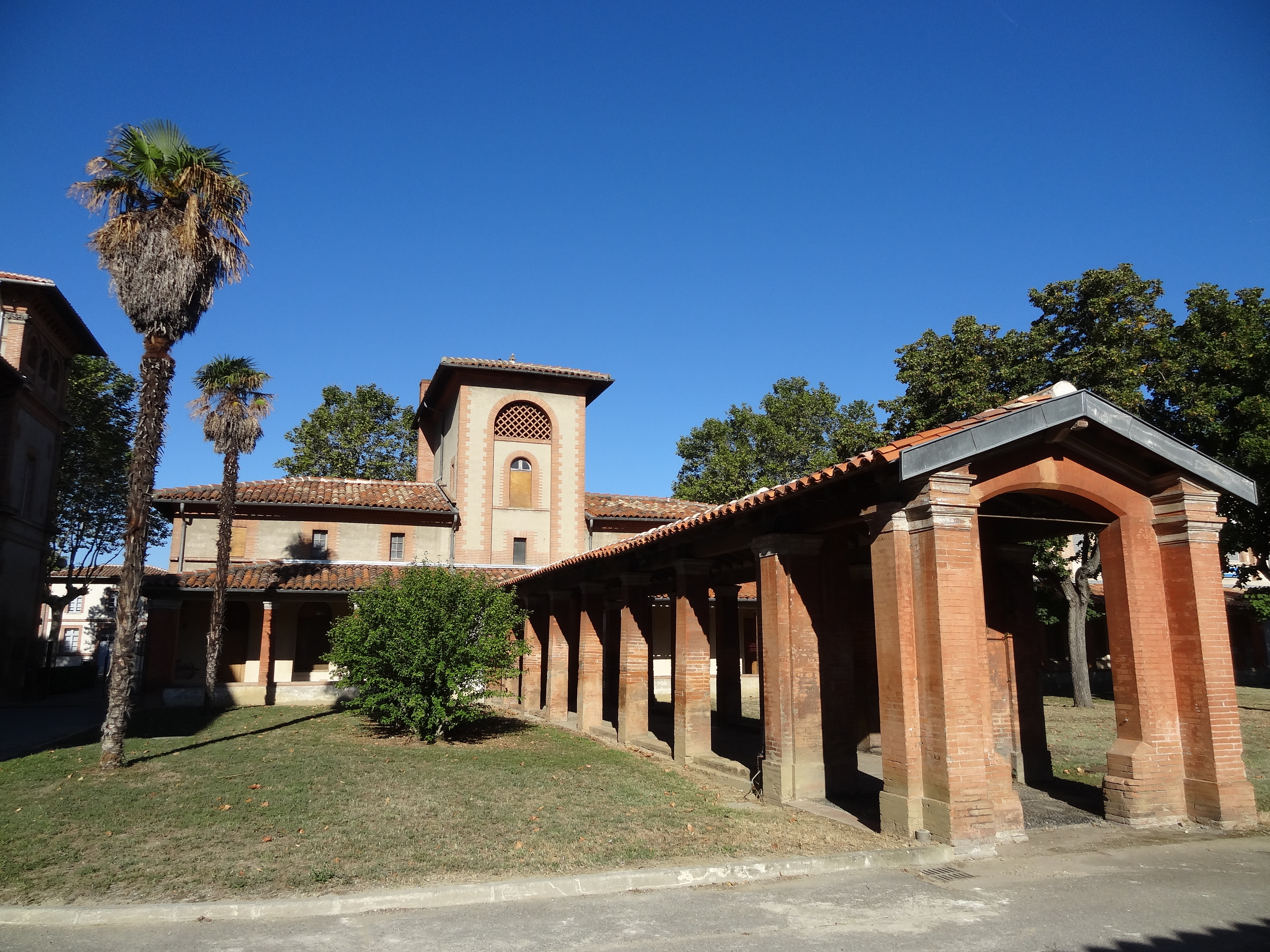 Centre hospitalier Gérard Marchant, à Toulouse, fortement endommagé par l'explosion de l'usine AZF en septembre 2001 .